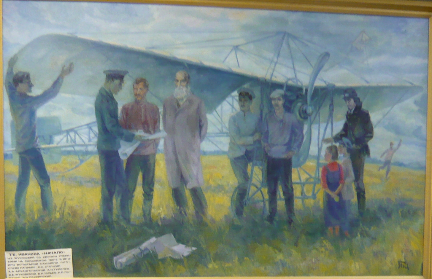 Экспозиция музея МАИ. Картина Татьяны Евгеньевны Ивановой «Начало» с изображением русского ученого Н. Е. Жуковского со своими учениками (слева направо) — Б. С. Стечкин, А. А. Архангельский, А. Н. Туполев, Н. Е. Жуковский, Б. Н. Юрьев, Л. Р. Лобанов, Б. И. Россинский на Ходынском поле в 1911 году при испытании самолета «ИТУ». Подробнее о творчестве автора картины можно прочитать в этом источнике.